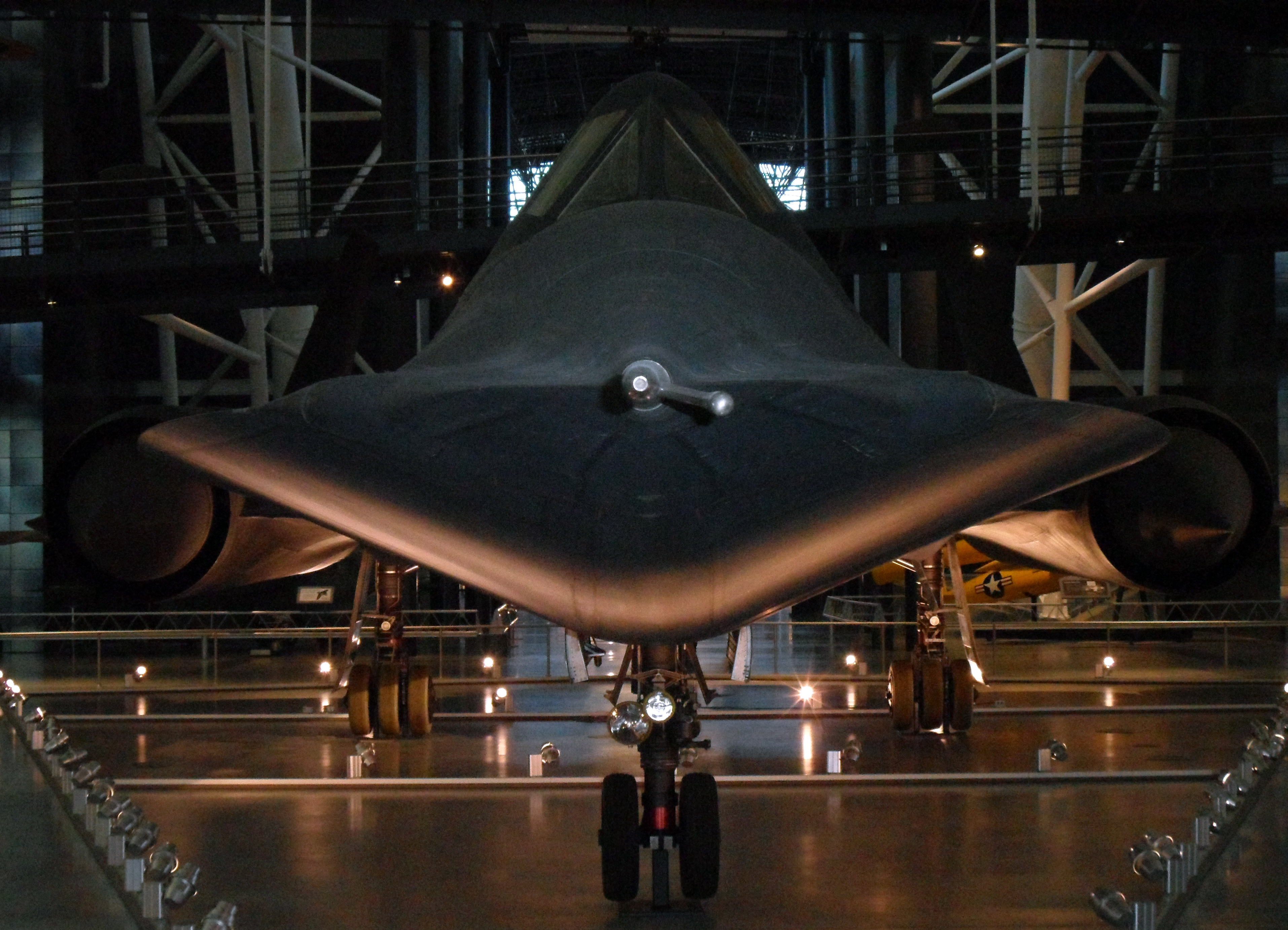 Die Lockheed SR-71A Blackbird im Steven F. Udvar-Házy Center; Front-Ansicht